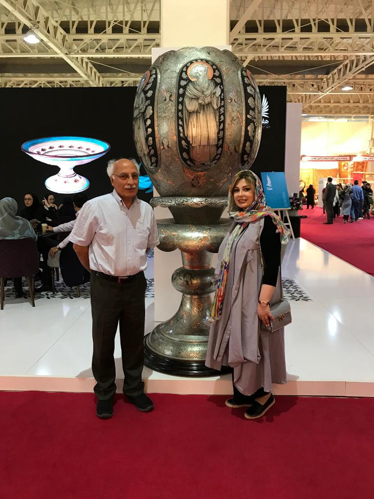 غنچه انبیا